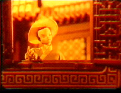 神笔，上海美影厂